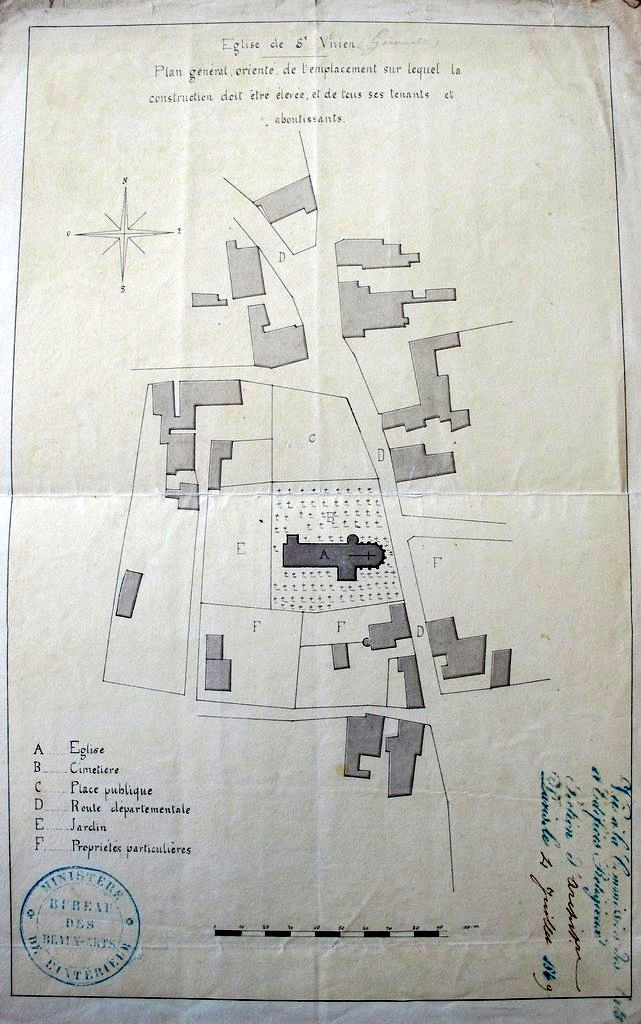 Saint-Vivien-de-Médoc - plan cadastrale de l'église 1849